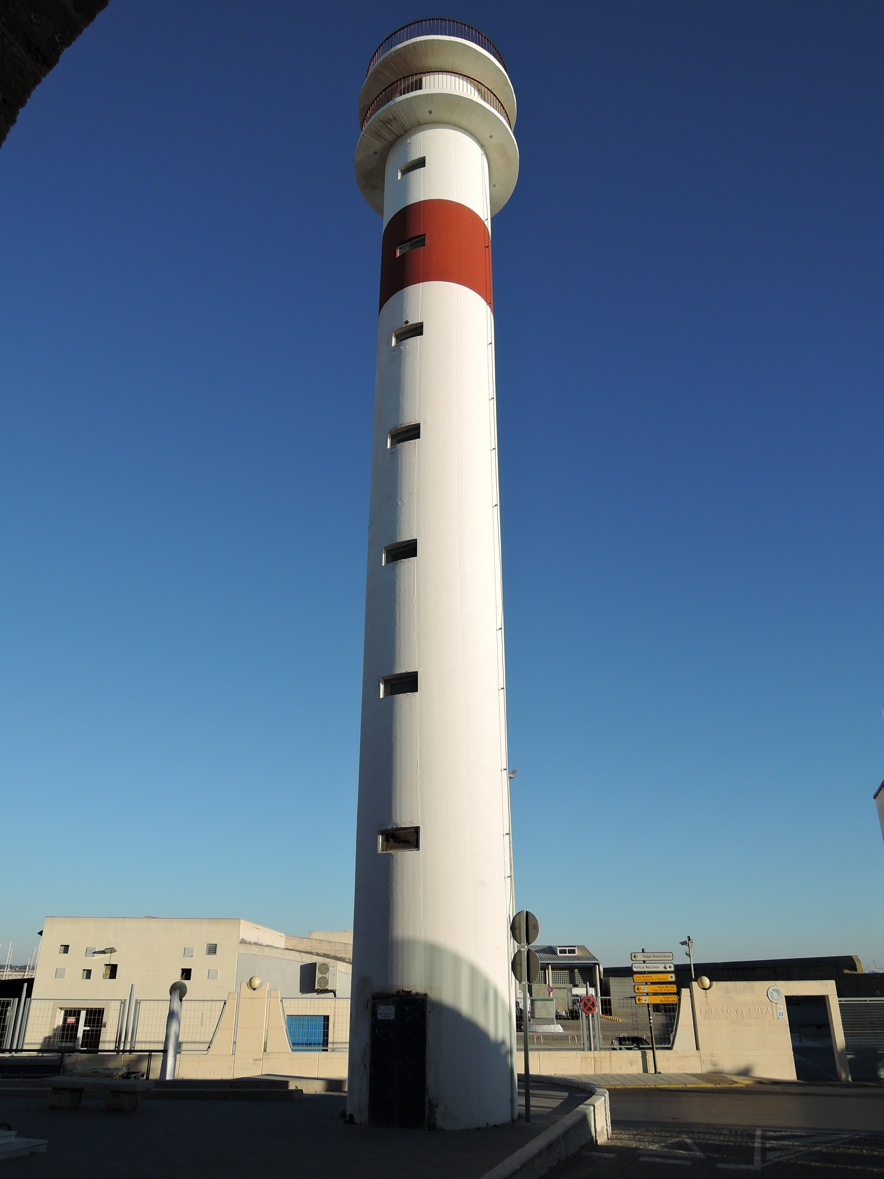 Leuchtturm in Rota